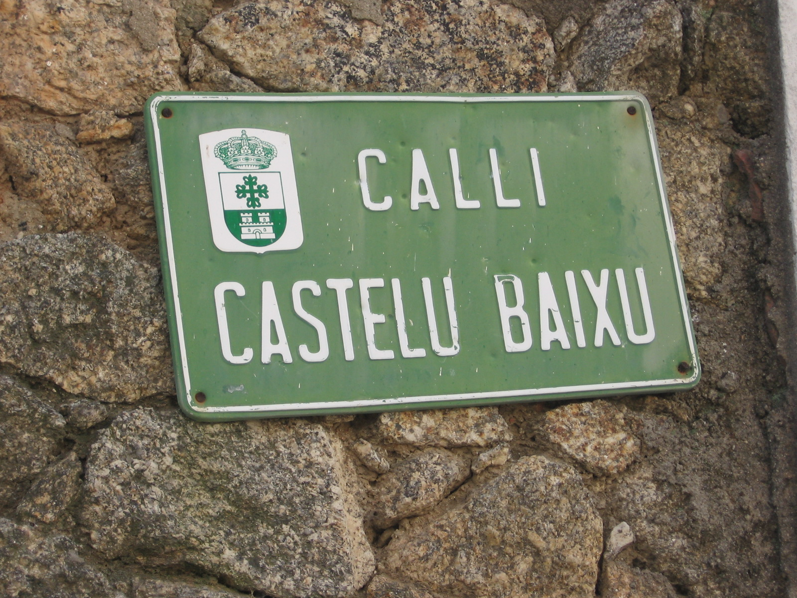 Placa del nombre de una calle de Eljas (Cáceres, España)